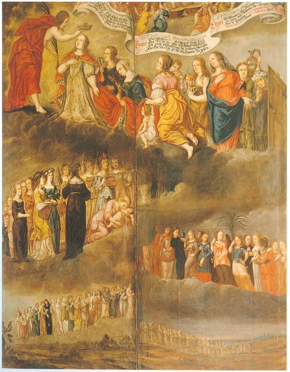 Brautzug der Sulamith Geschlossener Zustand der Kabbalistischen Lehrtafel in der Kirche von Bad Teinach Als Braut: Antonia Prinzessin von Württemberg, Schwester Eberhard III.